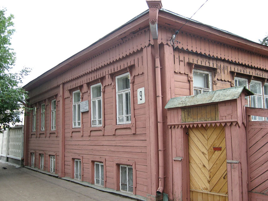 Дом, где в 1882-1941 гг. жил художник Куликов И.С.